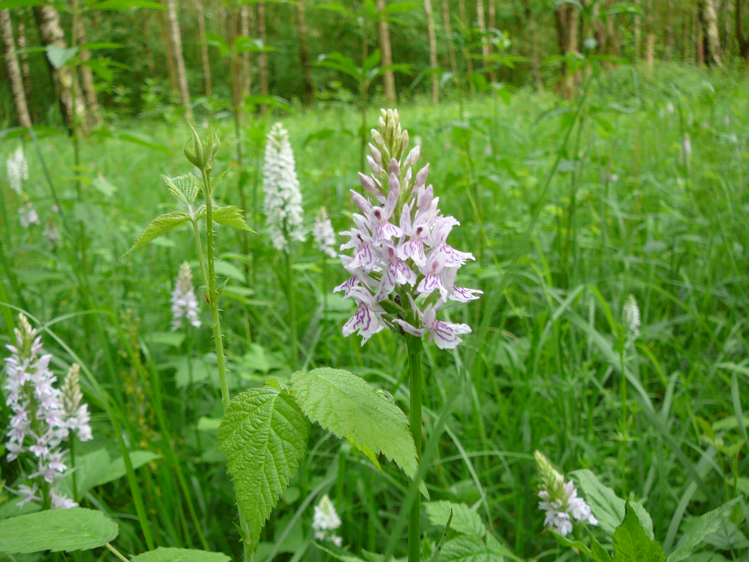 Dactylorhiza fuchsii